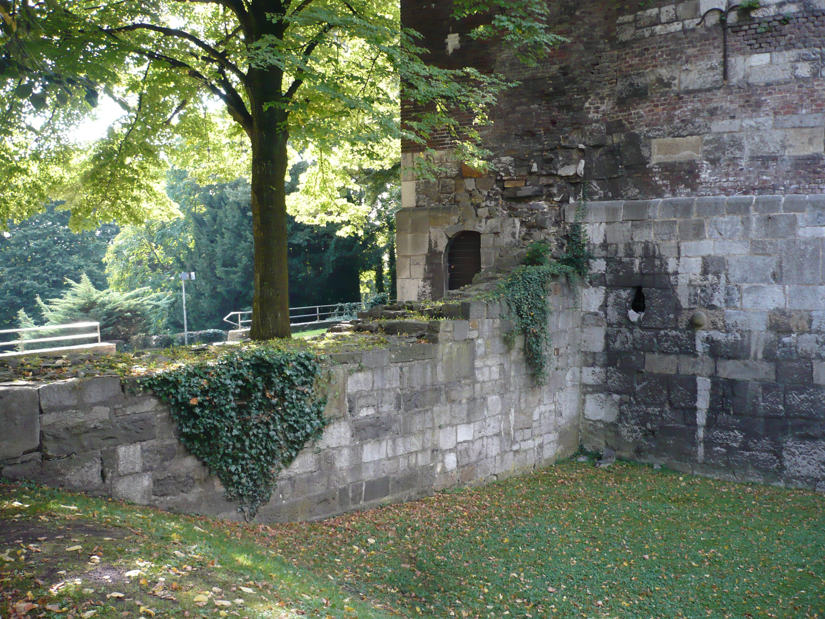 Marienburg in Aachen